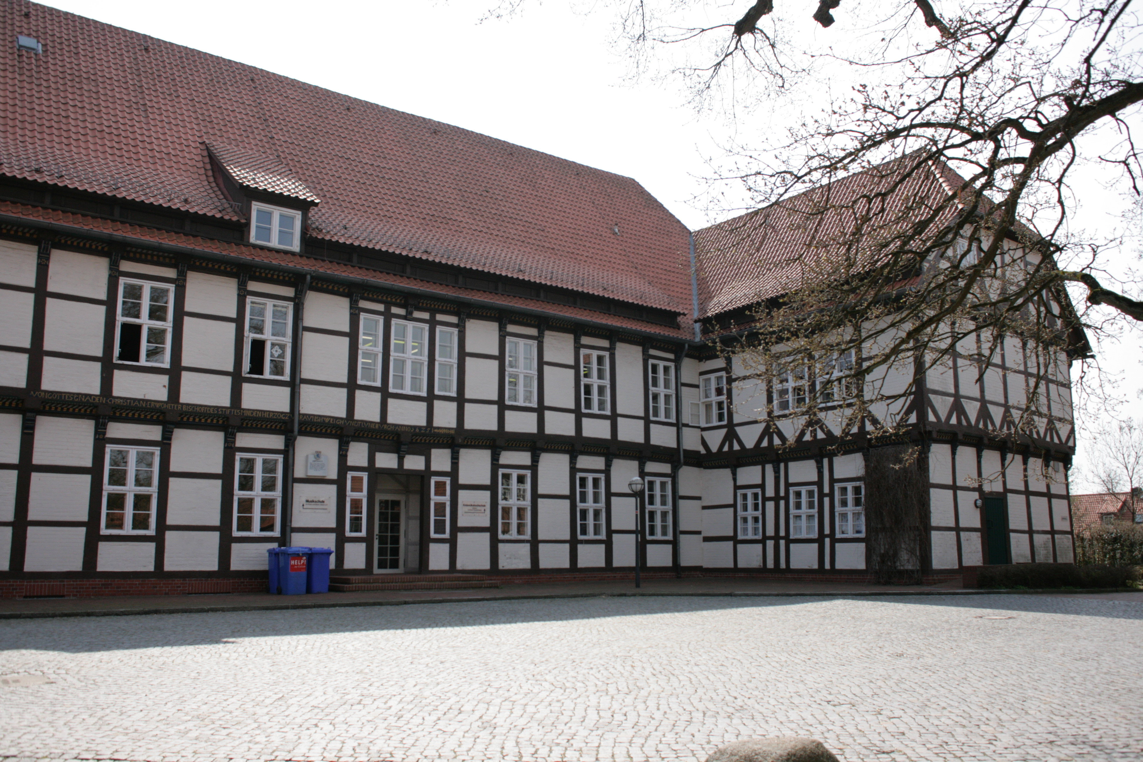 Amtshaus Oldenstadt, ehemals Kreishaus, jetzt Sitz von Musikschule und Volkshochschule, Am Alten Kreishaus in Oldenstadt, Uelzen